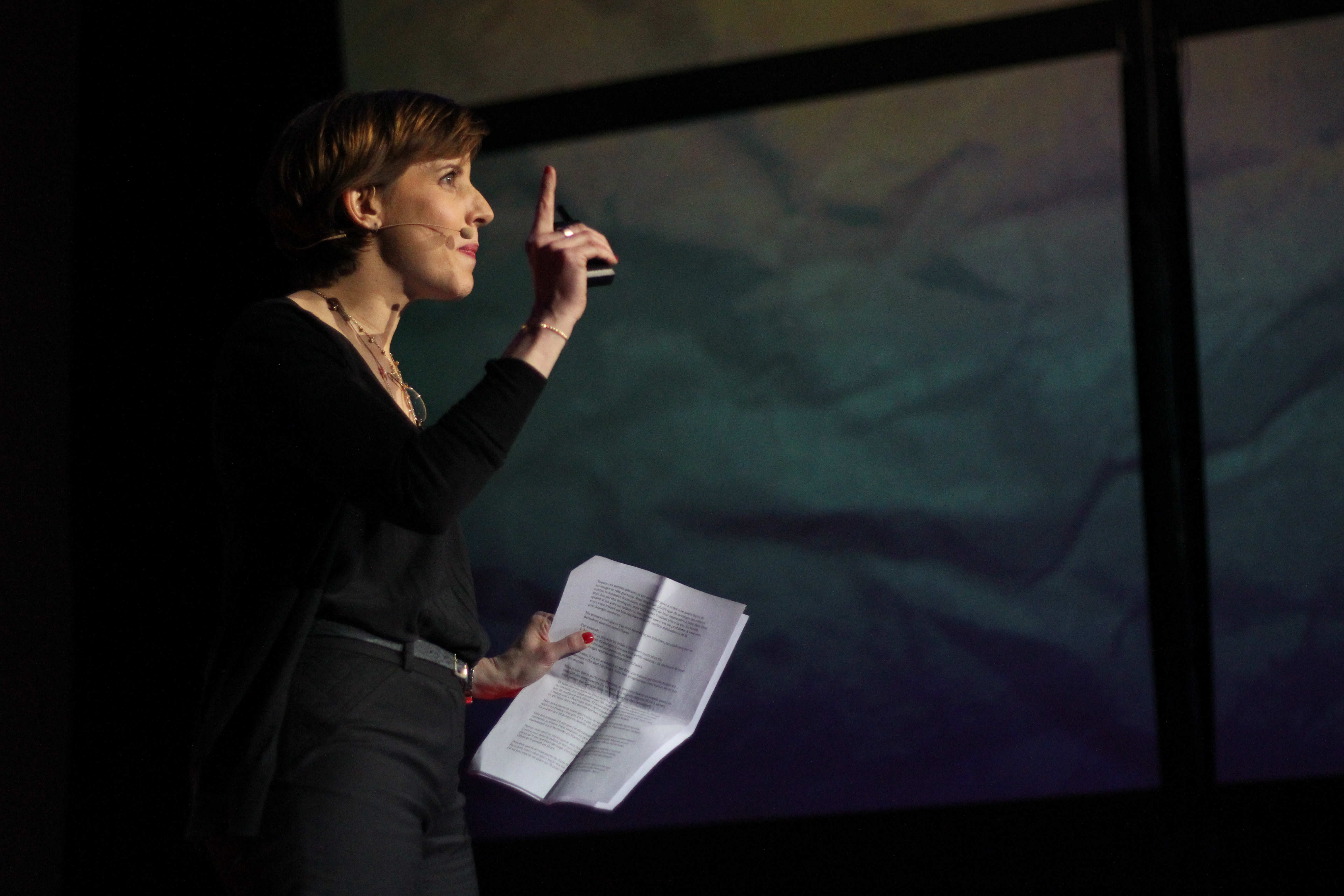 Pamela Druckermann au TEDxParis le 28 mars 2013